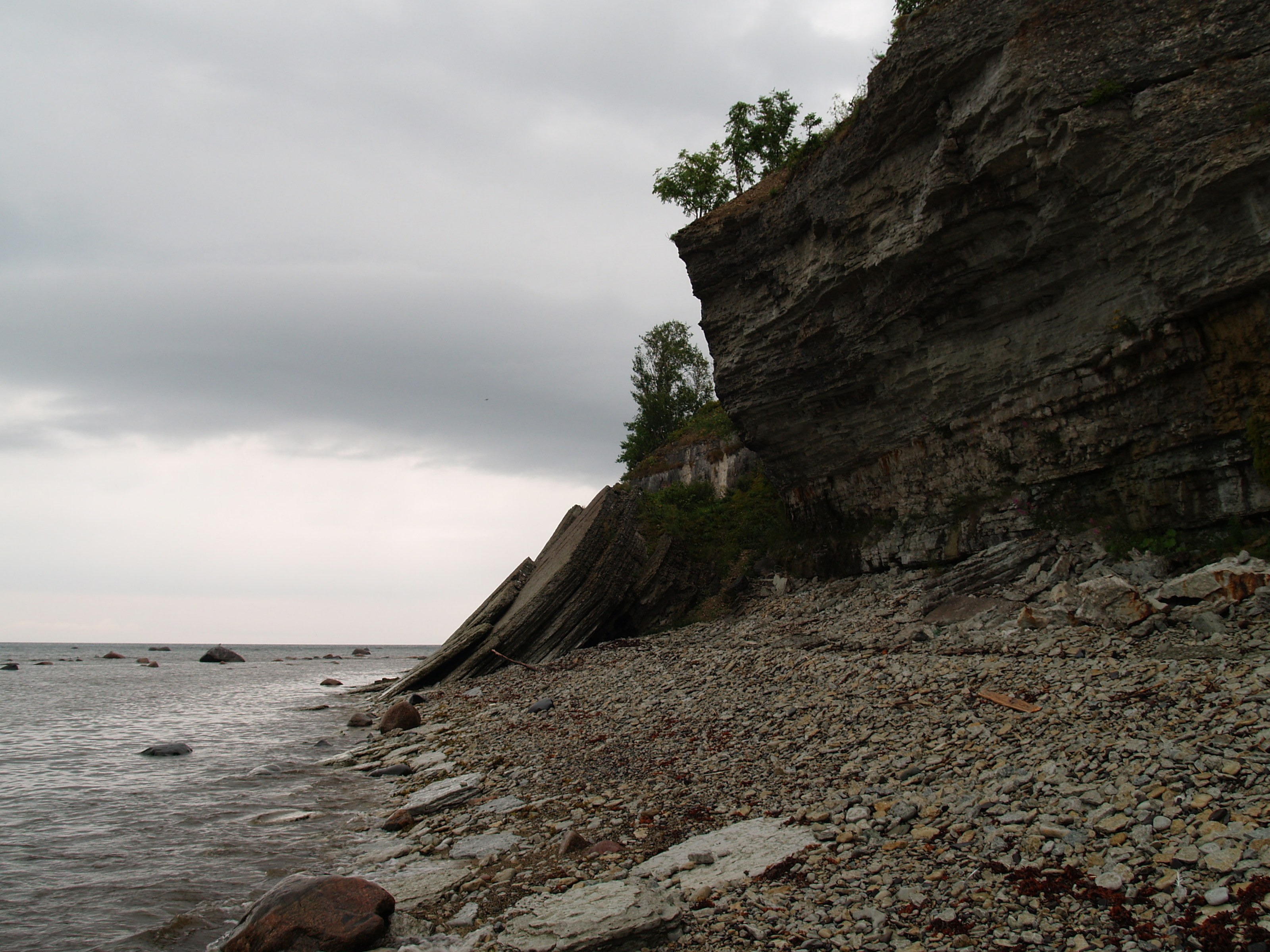 Väike-Pakri saare pankrannik